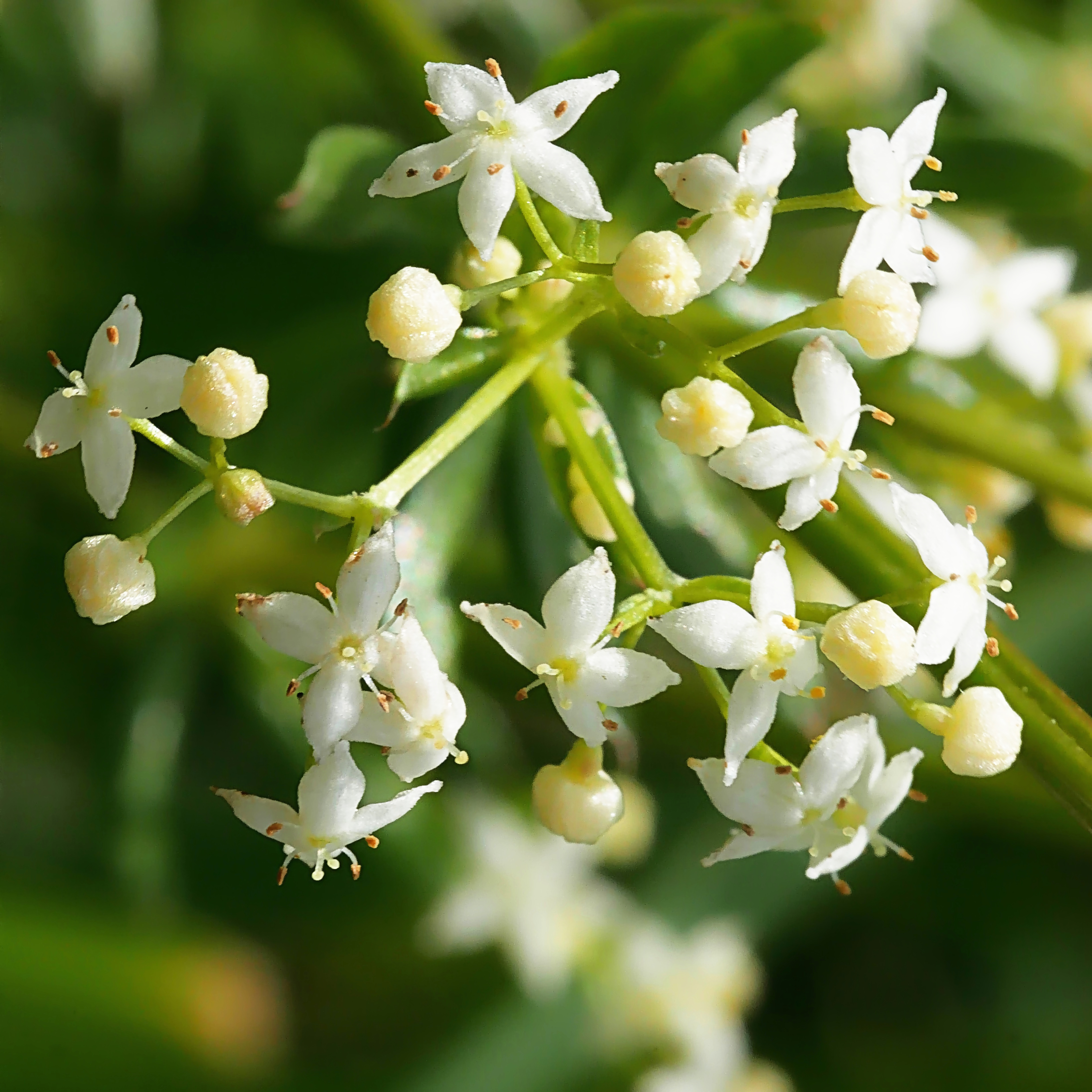 Weisses-Labkraut (Galium mollugo) im Freilichtmuseum Roscheider Hof oder Wiesen-Labkraut oder Sumpf-Labkraut. Standort: 30 m links vom Bienenlehrstand am Wassergraben.